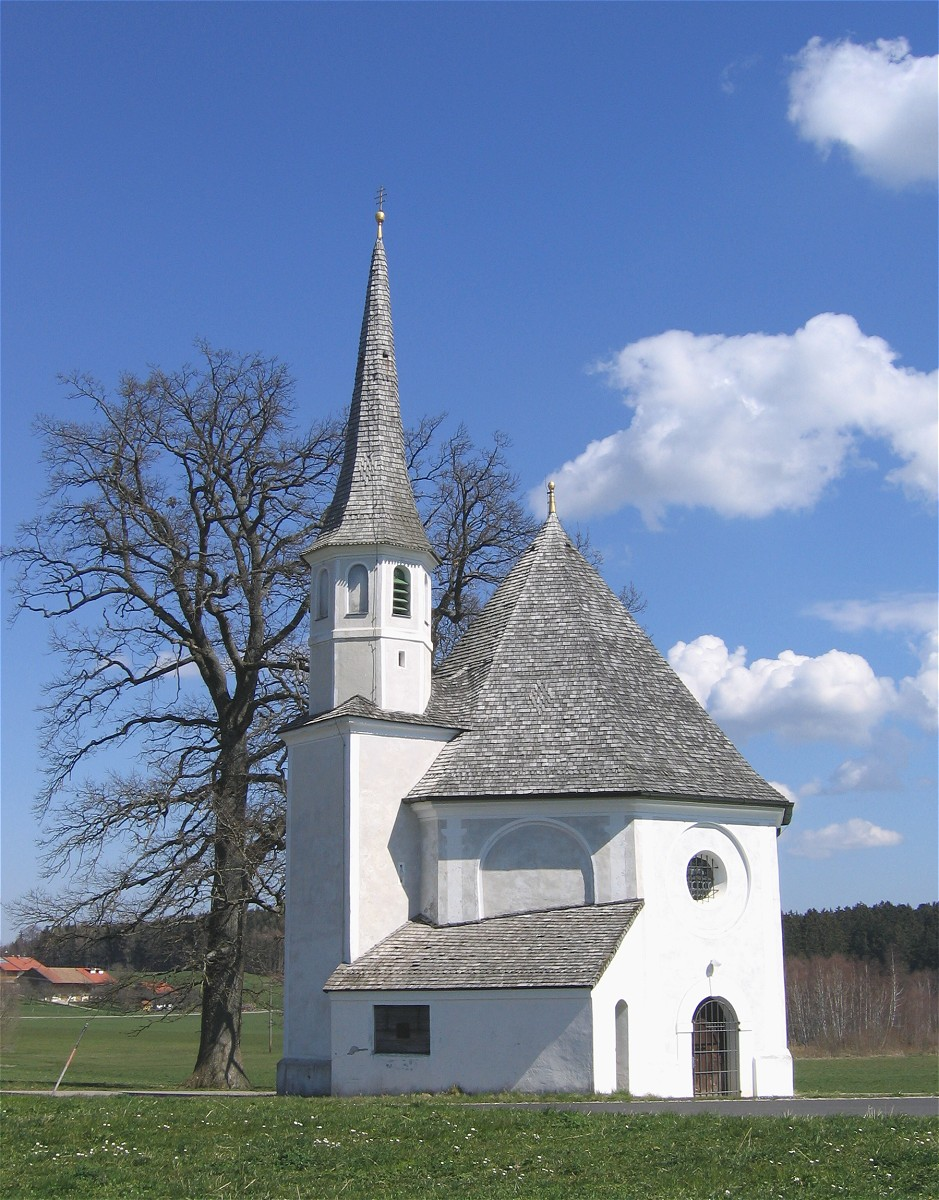 Leonhardskapelle bei Harmating, Egling